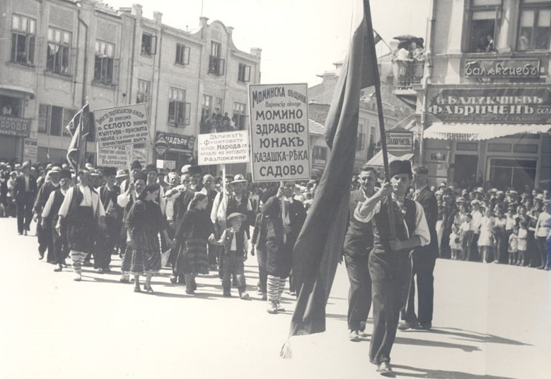 4-ти селскостопански културен и национален събор, 28 - 29 август 1938 г., гр. Варна. Парад на участниците в събора по ул. Княз Борис І. На преден план са представителите на Моминска община (дн. Авренска), Варненска околия.